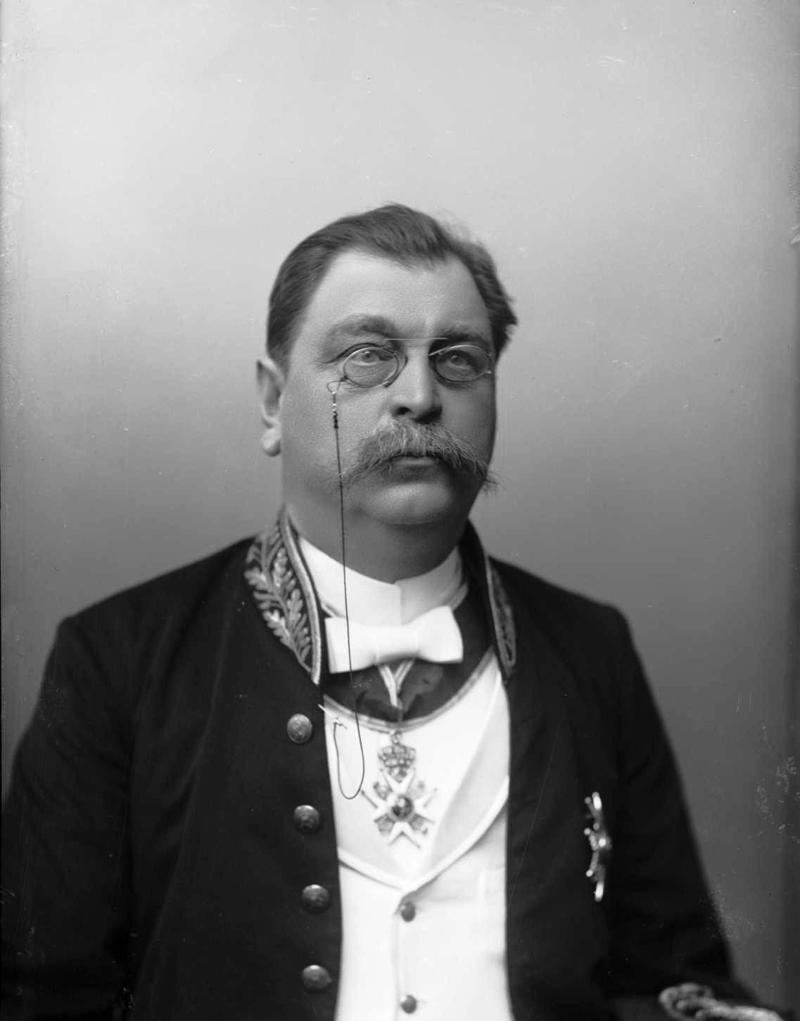 Hans Hein Theodor Nysom, portrett, mann, generaldirektør, statsråd, orden, brystbilde.